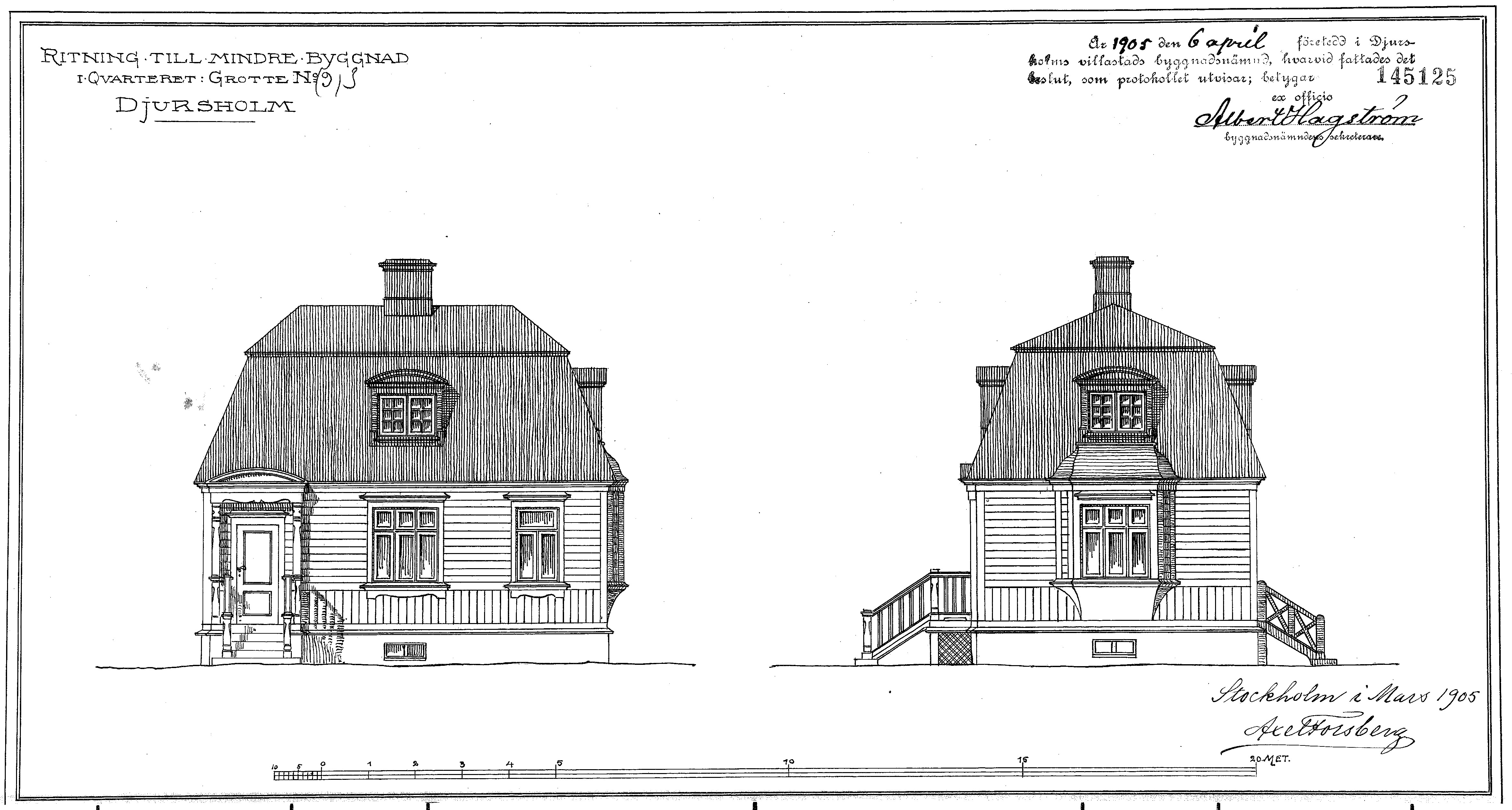 Fastigheten Grotte 7, Germaniavägen 14A, arkitekt Axel Viktor Forsberg